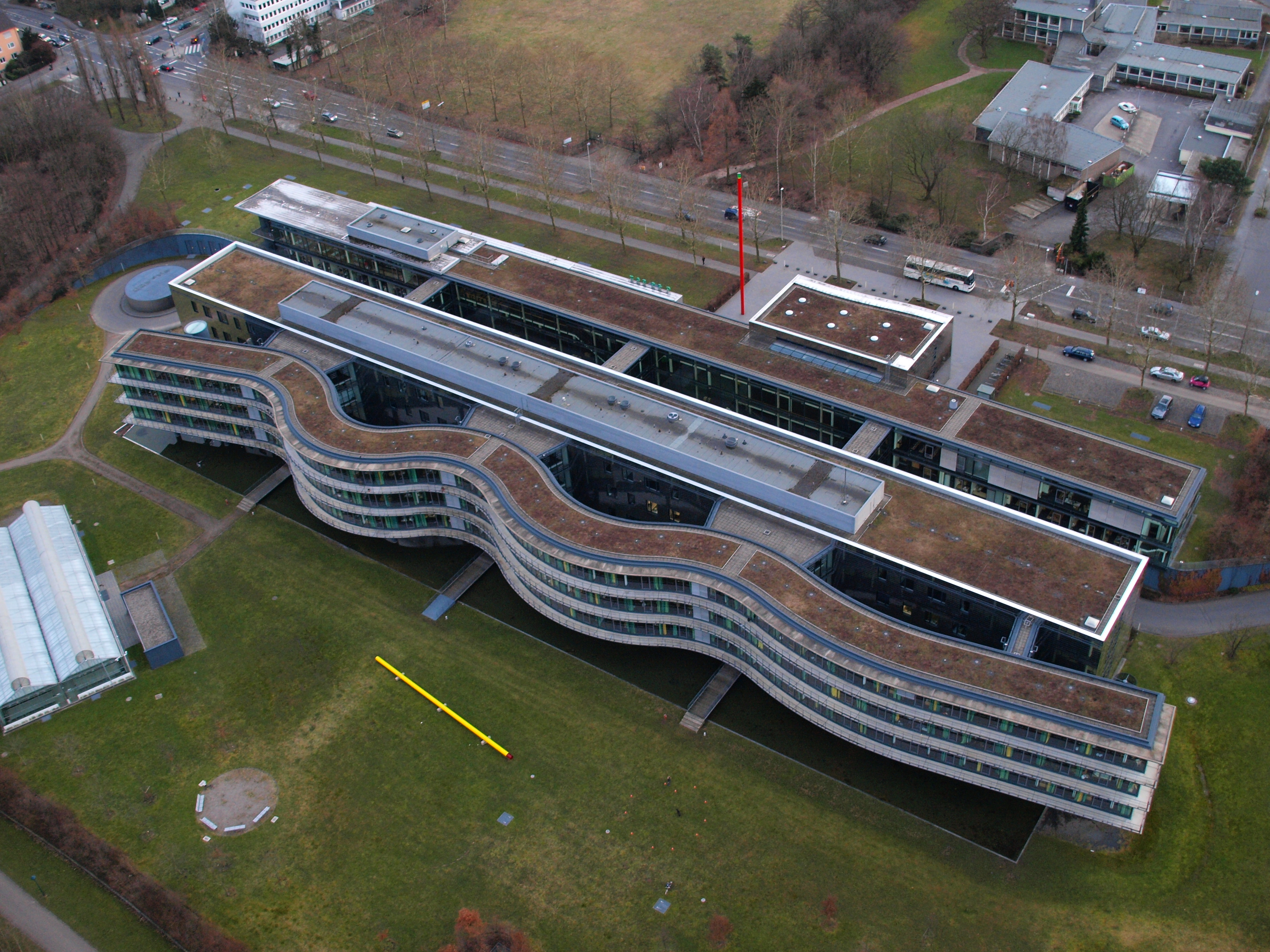 Forschungszentrum Caesar, Bonn: Luftaufnahme